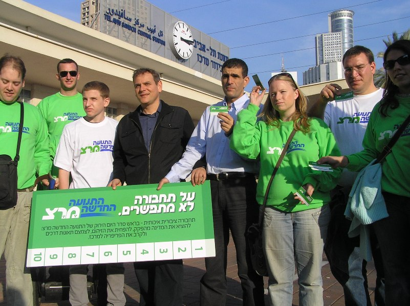 פעילי מרצ והמועמדים לכנסת ניצן הורוביץ ומוסי רז בהפגנה בעד עידוד התחבורה הציבורית, ונגד העלאת מחירי הנסיעה